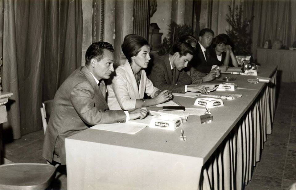 1963 - A Verrucchio/Forlì per un convegno organizzato da Gerardo Dasi - Sono riconoscibi Carmelo Genovese e Franco Passoni